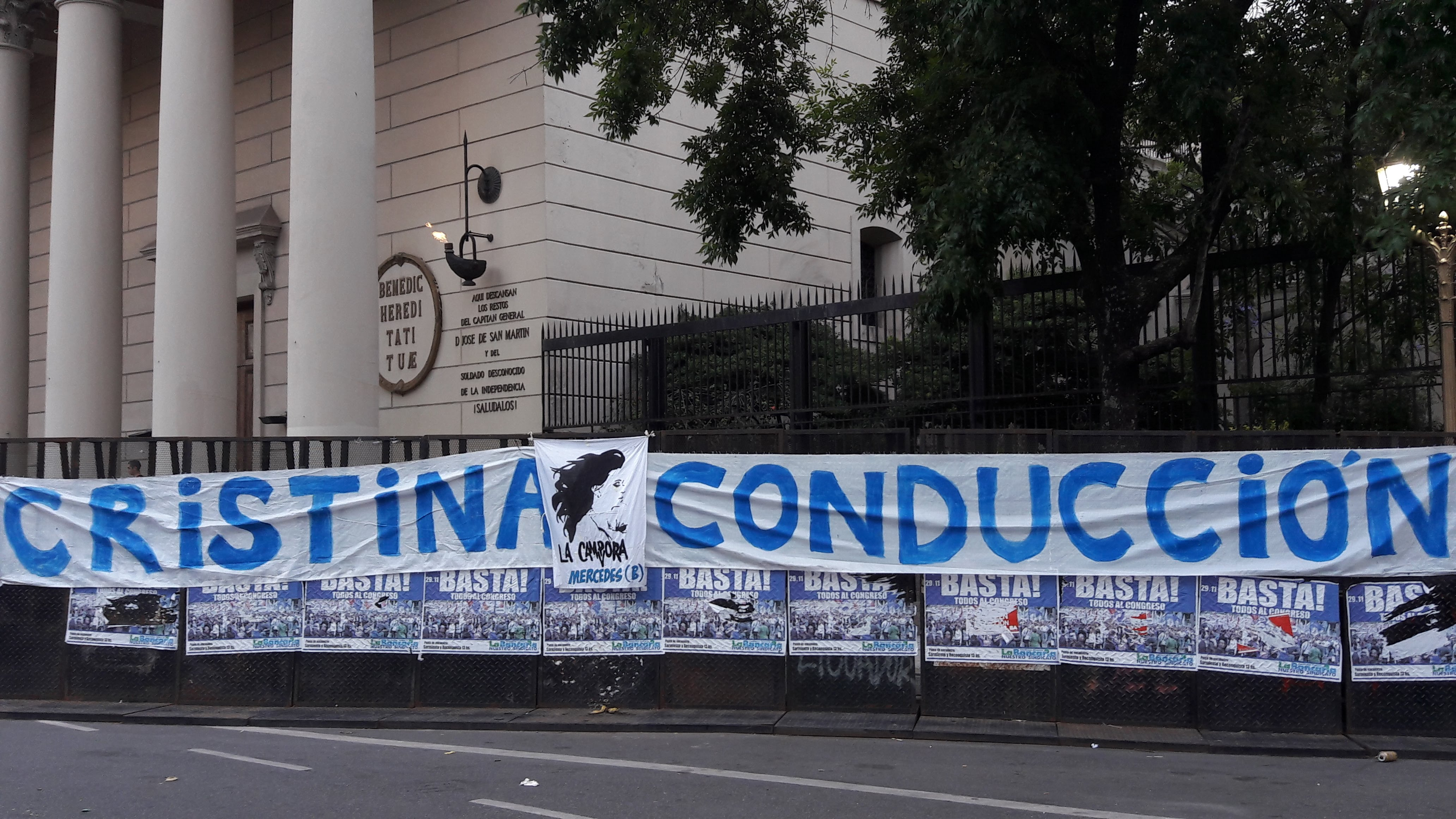 Cartel de La Cámpora en apoyo a Cristina Fernández de Kirchner.